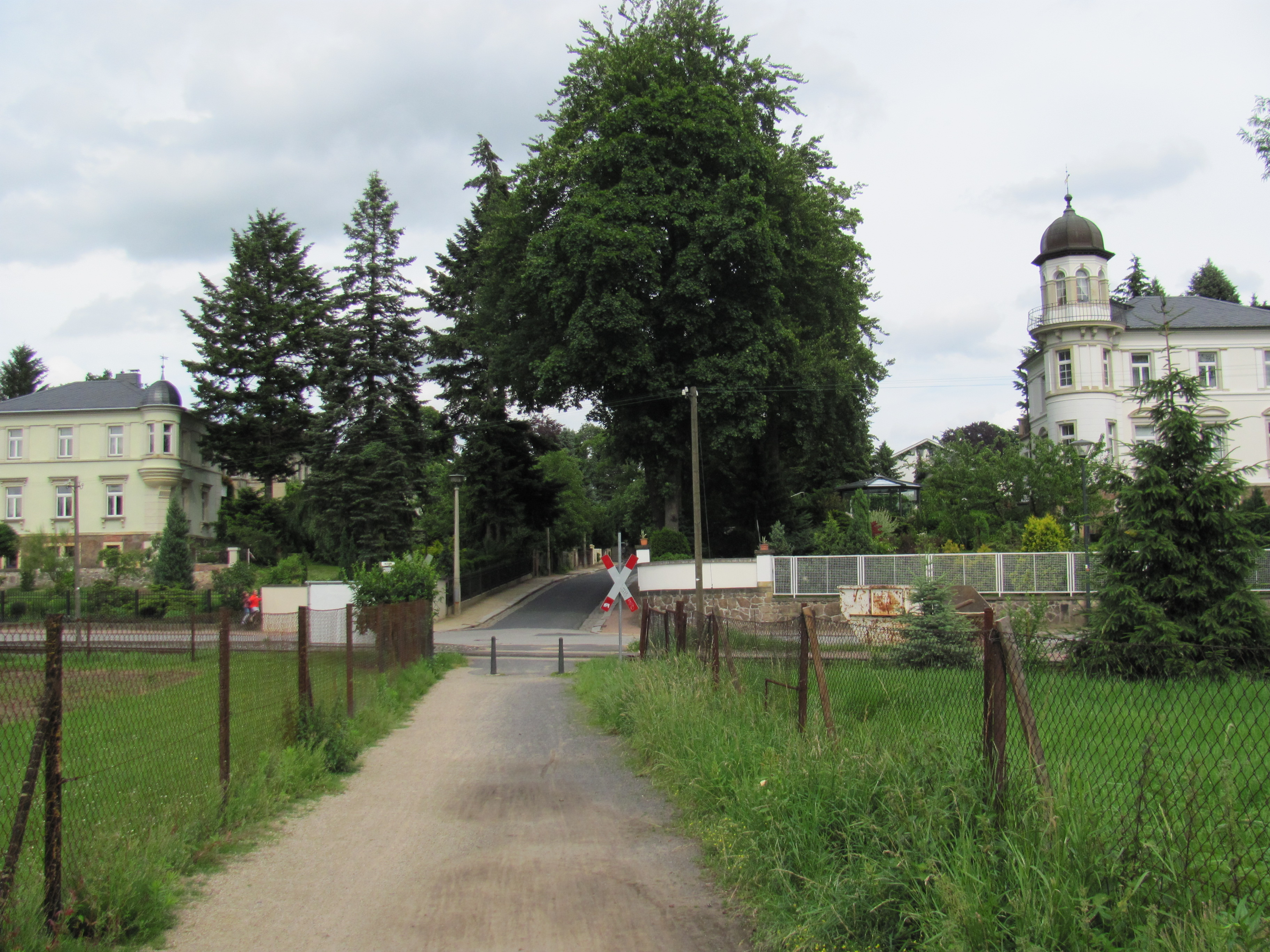 Radebeul, Nizzastraße, getürmter Eingang nach Oberlößnitz. Kreuzung mit Mühlweg und Lößnitzdackel